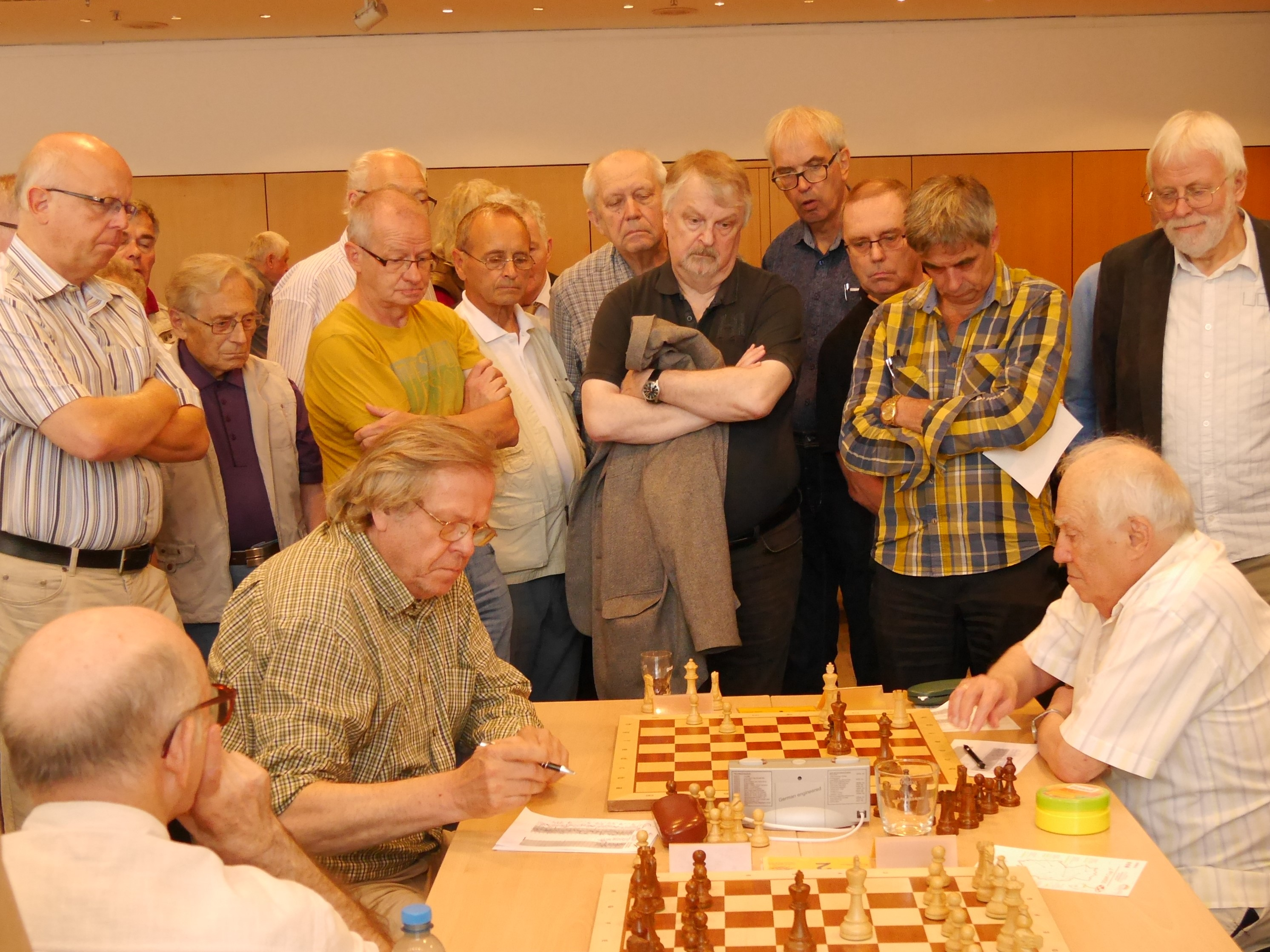 Die alles entscheidende Partie der letzten Runde, deutsche Seniorenmeisterschaft 2017 in Berlin. Links Bodo Schmidt und rechts Jefim Rotstein, der die Partie gewann und damit deutscher Seniorenmeister 2017 wurde.